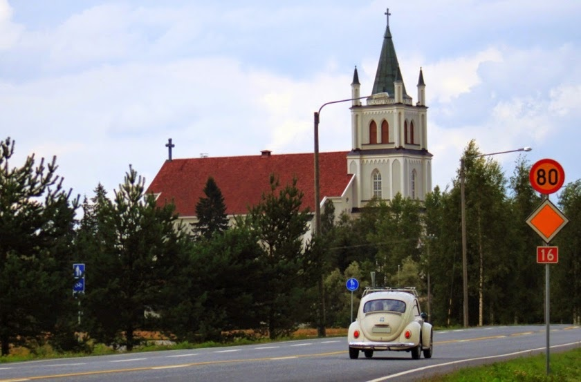 Ylistaro, Kirkko, Seinäjoki, Komia Kirkko